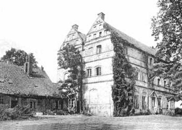 Herrenhaus Üselitz auf Rügen (Mecklenburg-Vorpommern), Ansicht vermutlich um 1900 entstanden. Im 16. Jahrhundert errichtetes Herrenhaus im Stil der Renaissance. Bis 2017 eine Ruine, seitdem wieder aufgebaut.